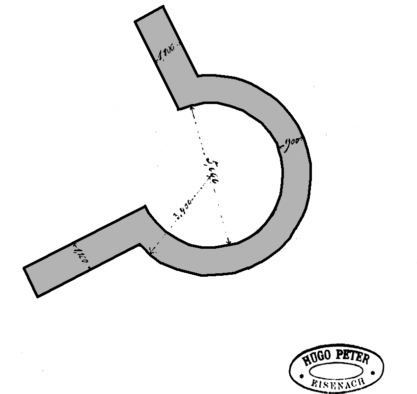 Eisenach, Befund zur Peterskirche